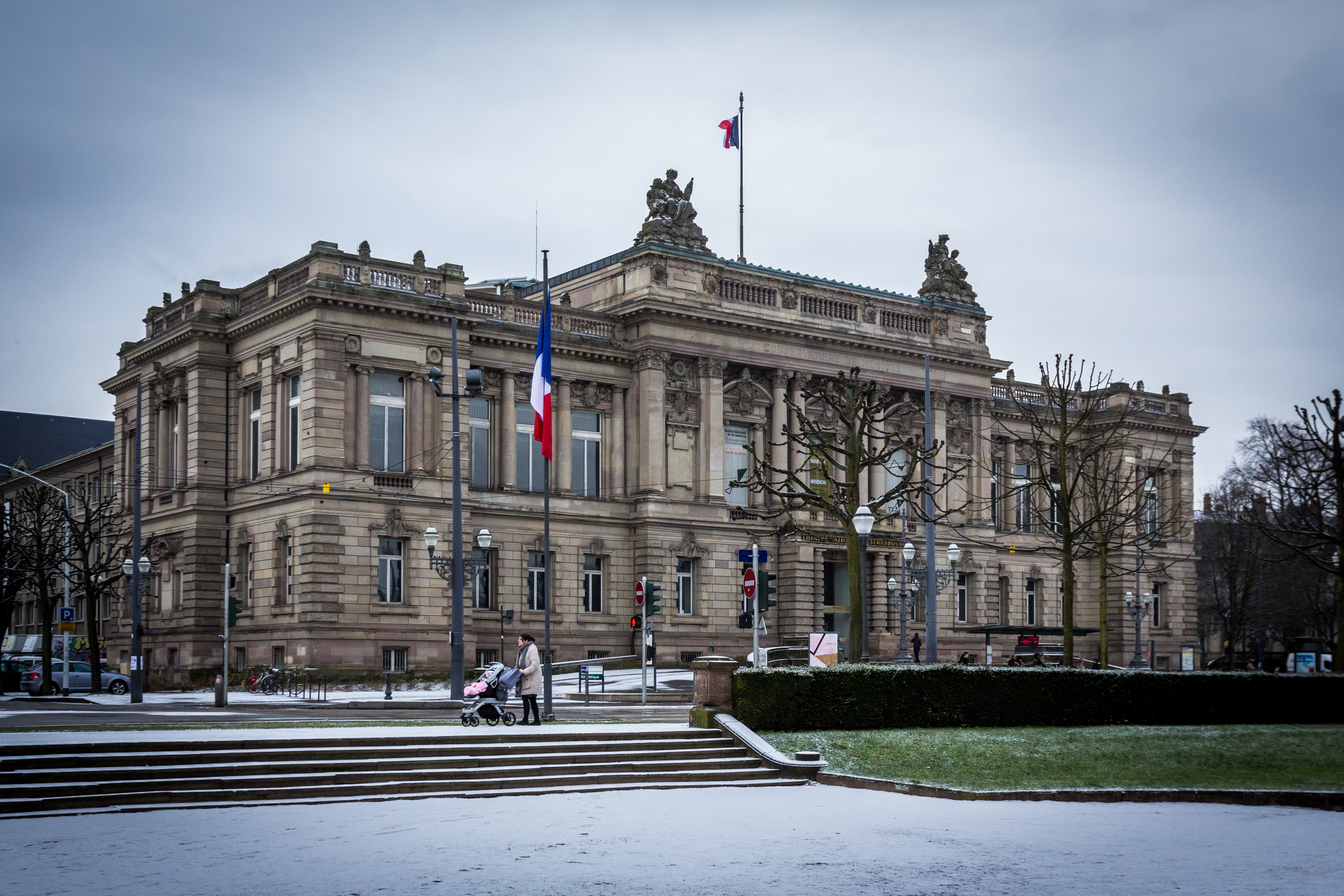 Strasbourg place de la République ancien Landesausschuss